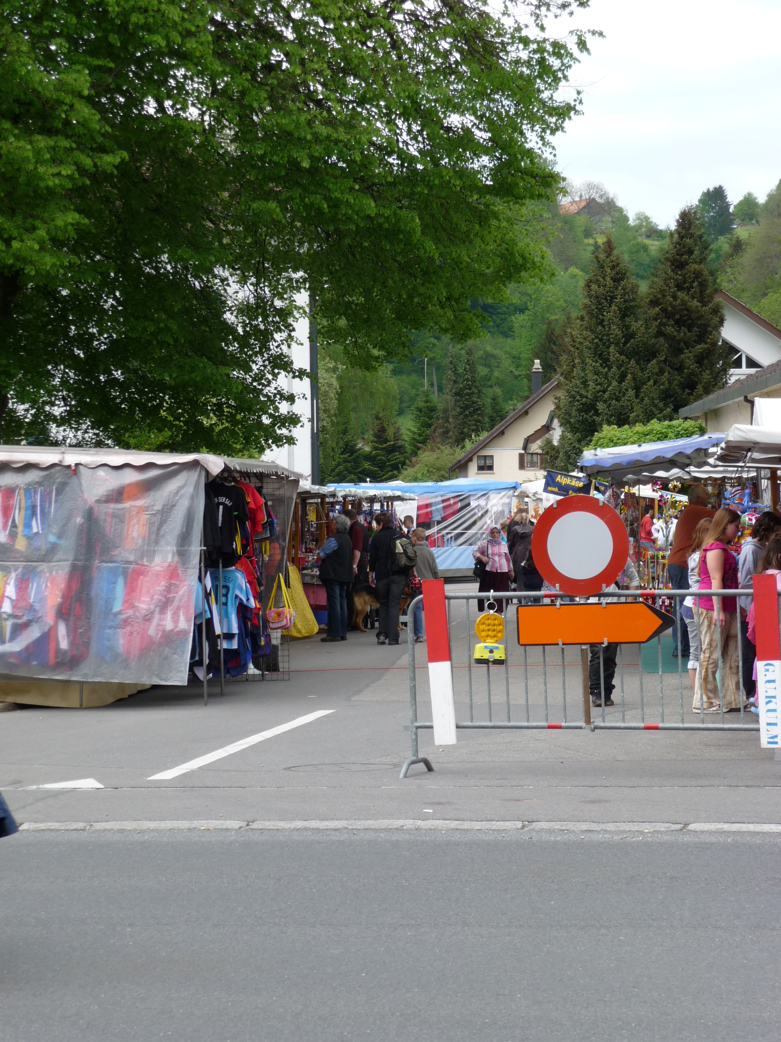 Markt inUnterkulm